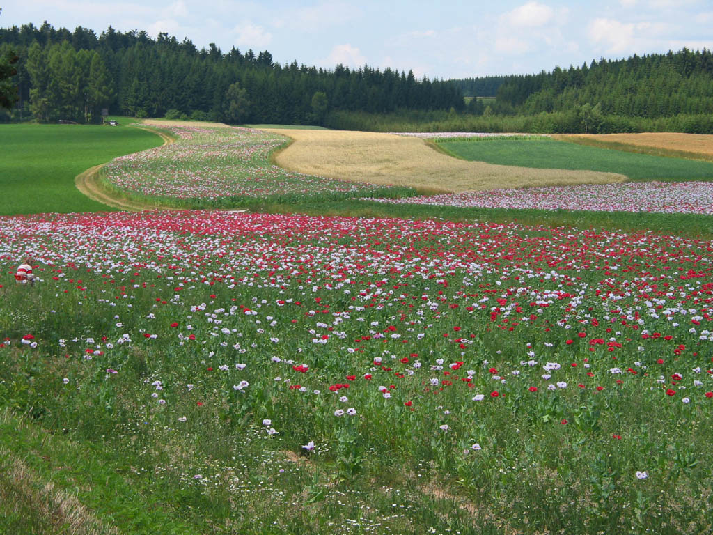 Mohnfeld (Papaver somniferum) bei Armschlag, Waldviertel